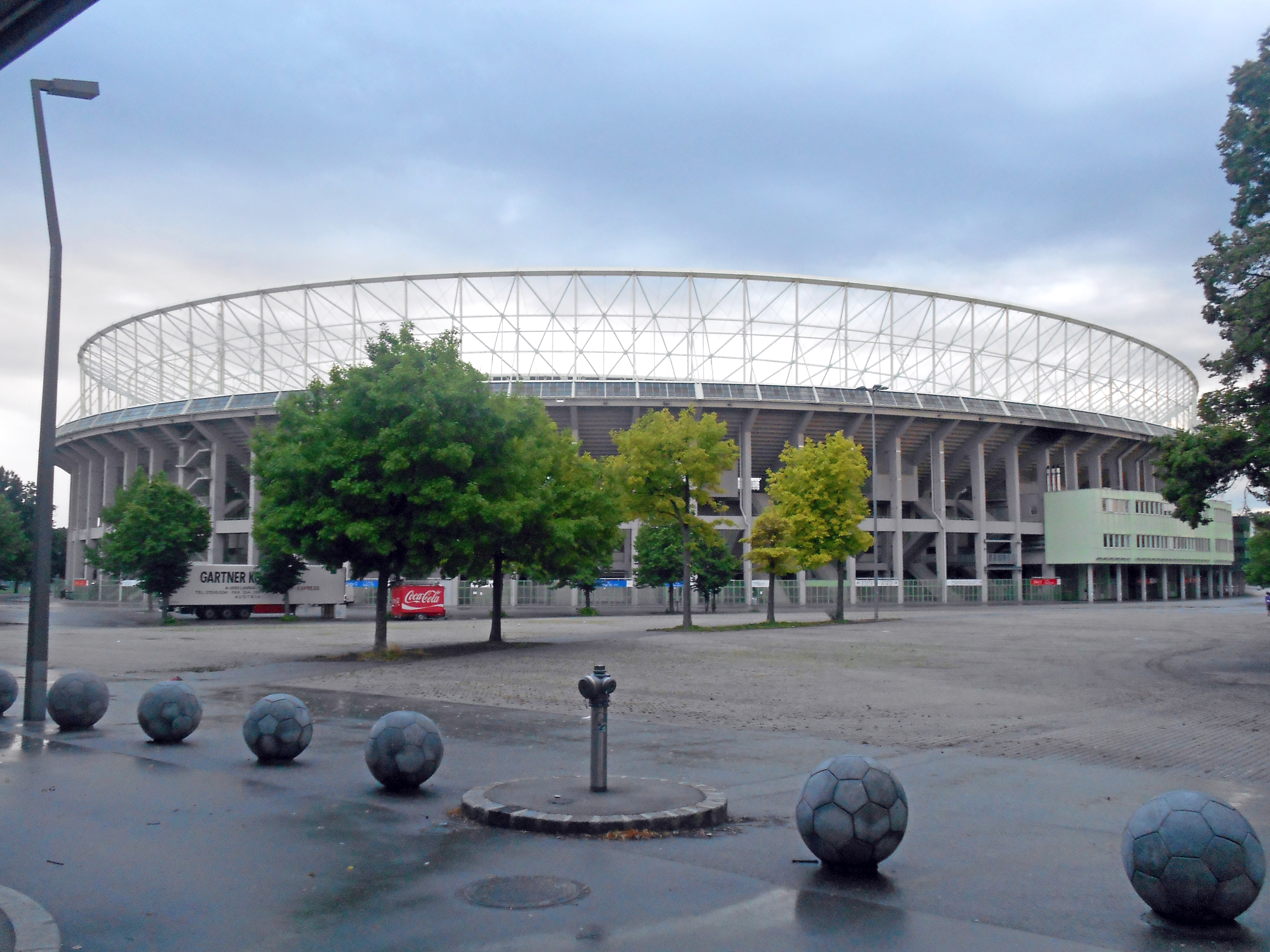 Ernst-Happel Stadion (selbst fotografiert) Beschreibung: Foto Ernst-Happel-Stadion 4.6.2004 Quelle: eigenes Foto Fotograf oder Zeichner: Extrawurst Andere Versionen: - Lizenzstatus: GNU FDL